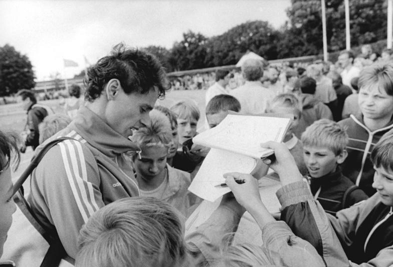 Jens Carlowitz ADN-ZB Oberst 13.9.88 Berlin: Leichtathletik-Meeting zur Verabschiedung der Olympiastarter- Hoch im Kurs waren bei den jungen Autogrammsammlern im Leichtathletik-Stadion des Sportforums die Unterschriften der Olympiateilnehmer. Im Foto ist der Zweitplazierte des 400-m-Laufes, Jens Carlowitz (SC Karl-Marx-Stadt), umringt.